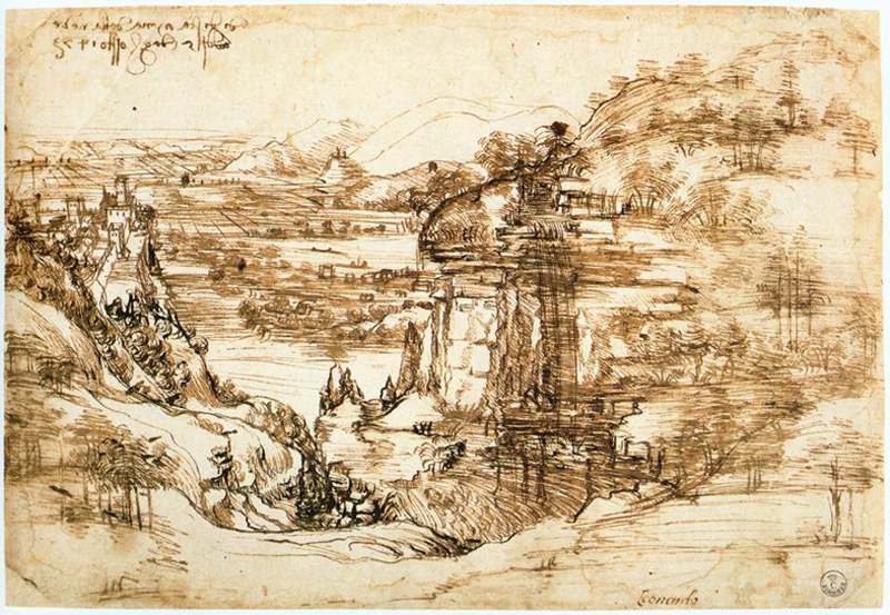 Paisagem do Arno